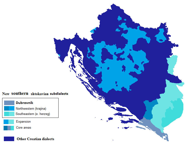 Prikaz ekspanzije poddijalekata novoštokavske jekavice